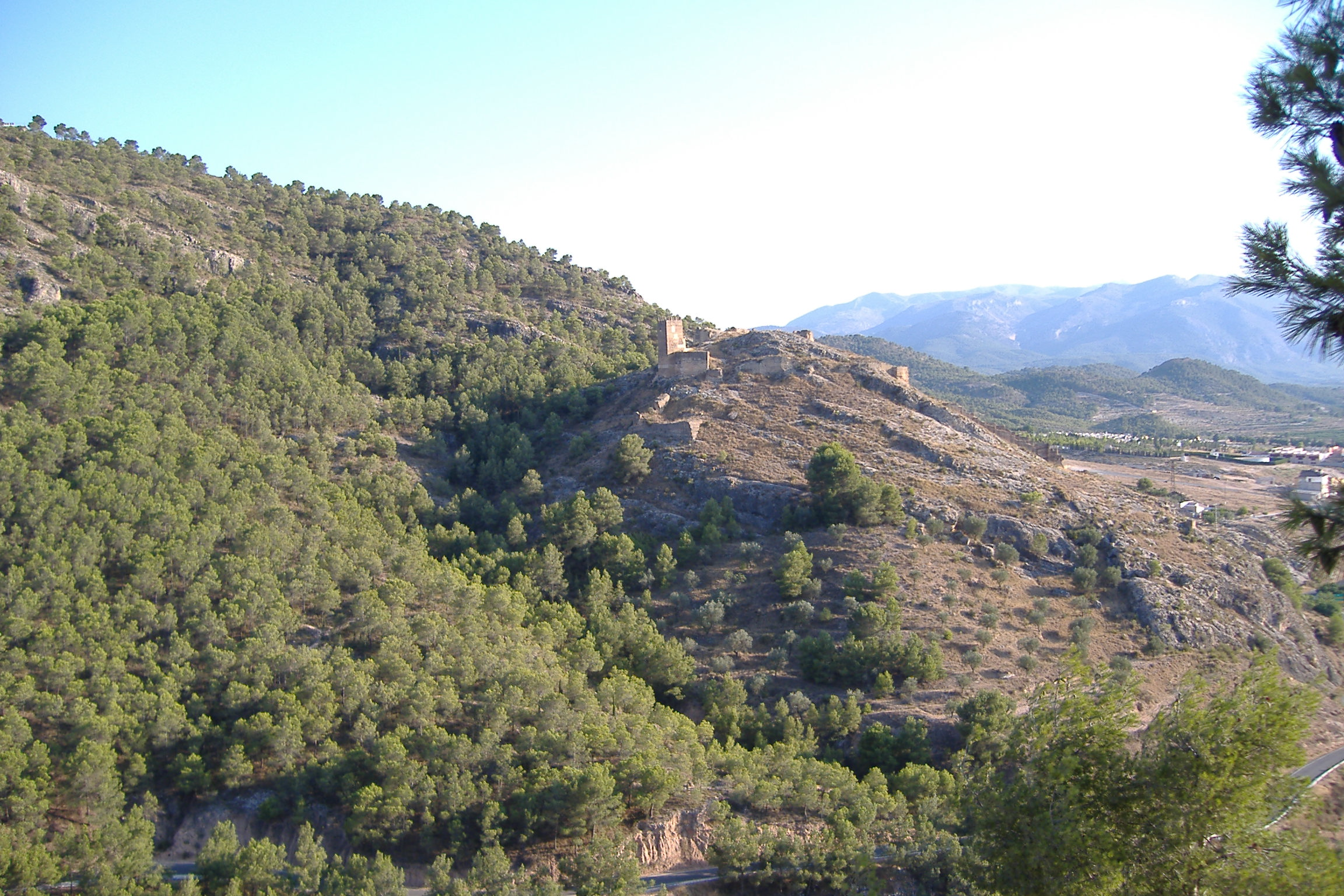 Castillo de Pliego (Murcia).